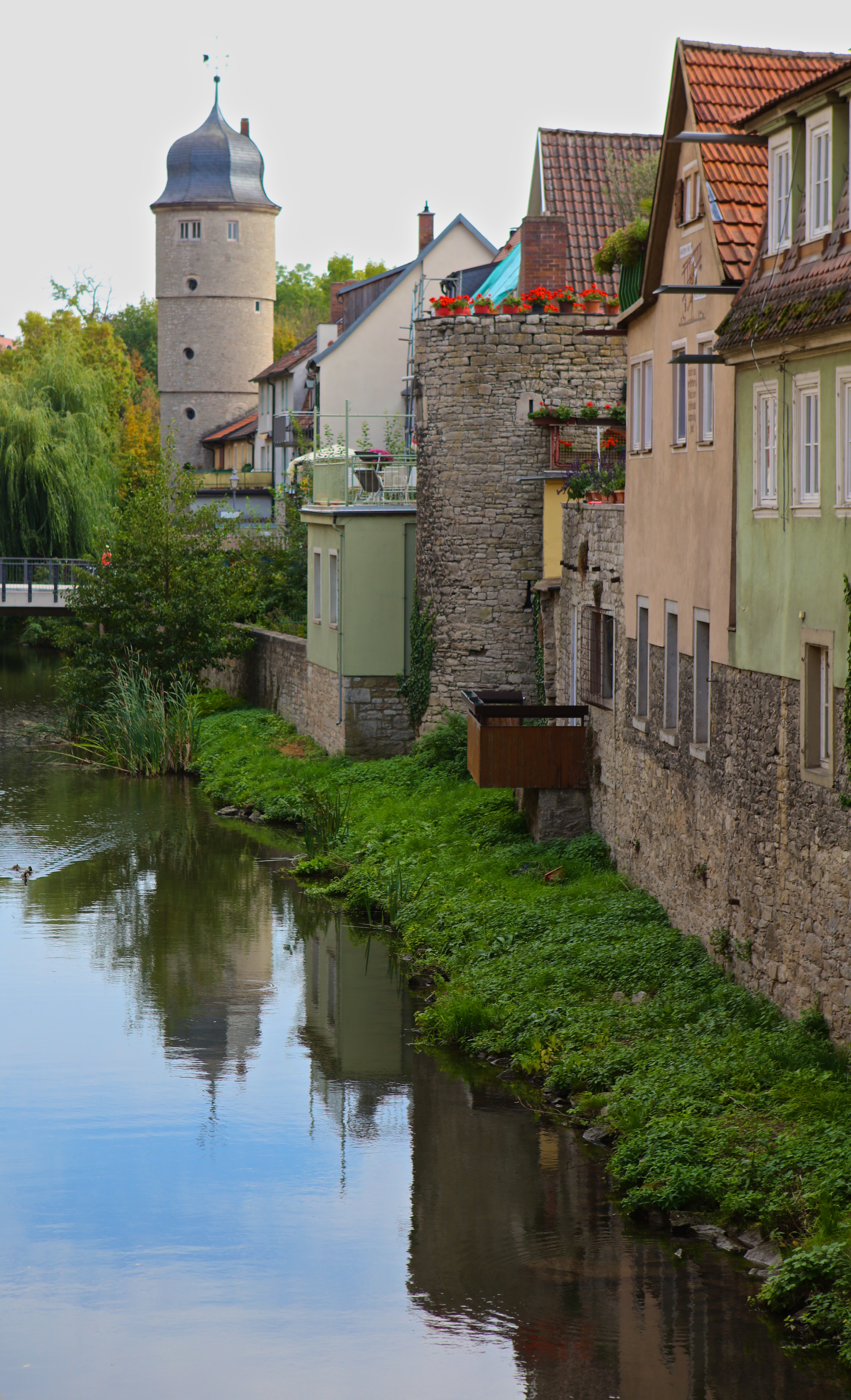 Marktbreit